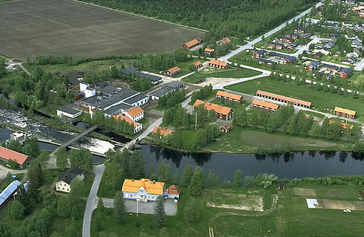 Motiv: Robertsfors Nyckelord: Flygbilder, Riksintressen Kategori: Bruksmiljö.